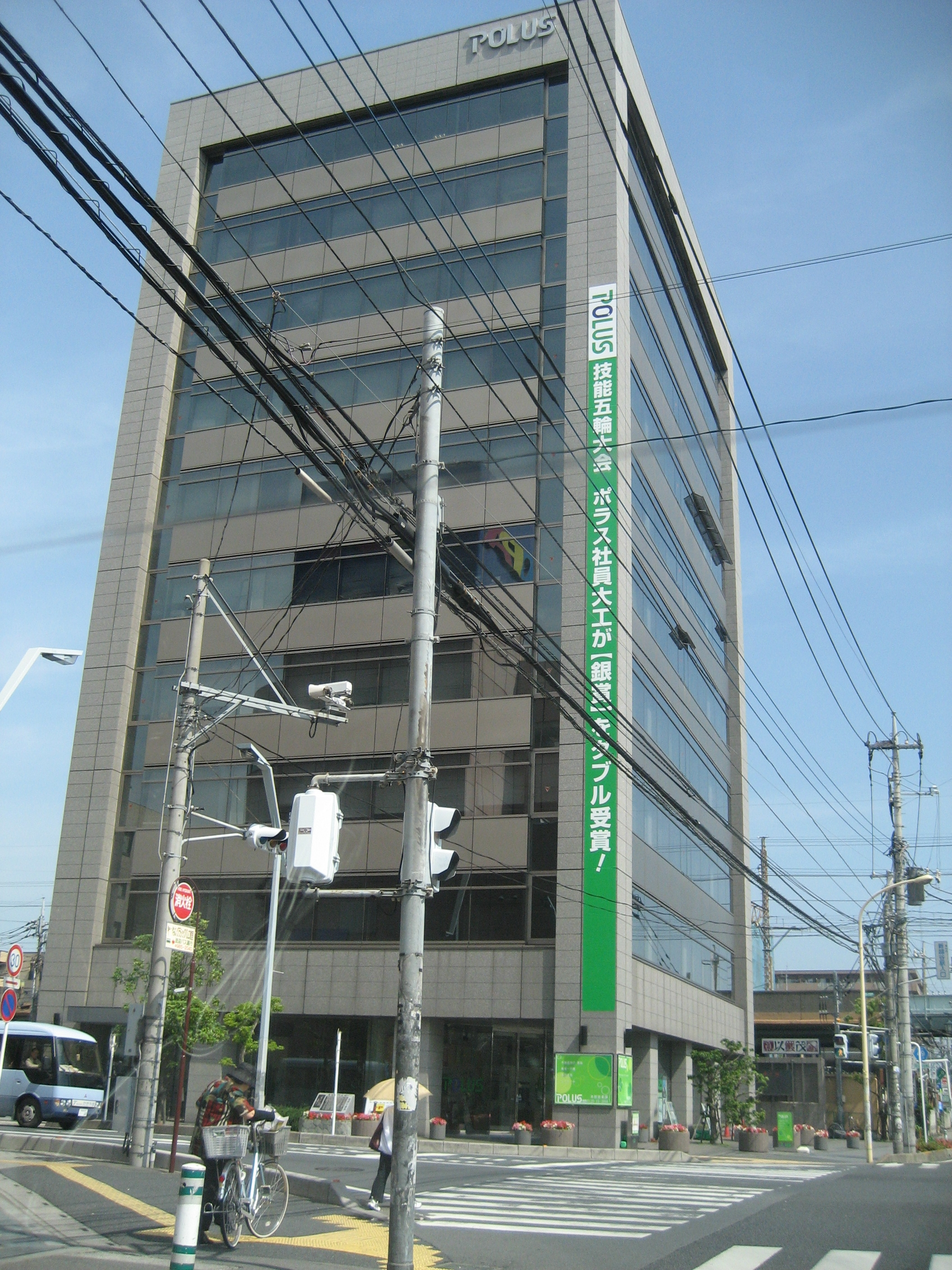 ポラス本社